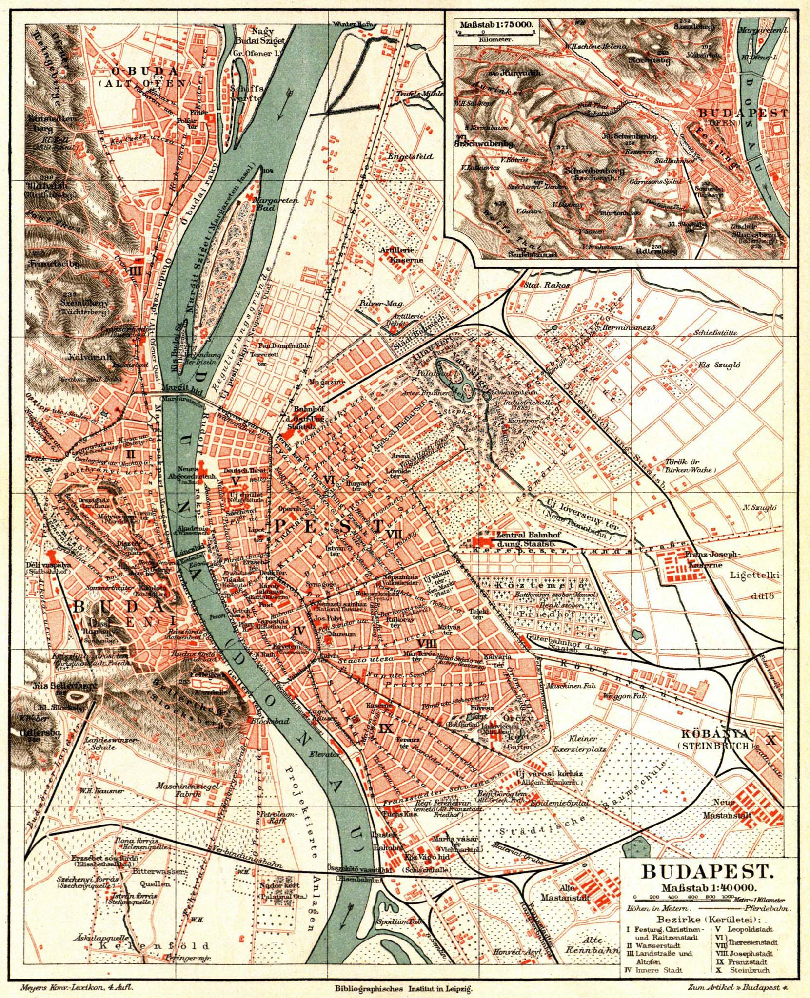 Budapest (1 : 40.000); westliche Umgebung (1 : 75.000)